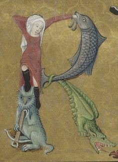 Letter R Crop of folio 52r Heures de Charles d'Angoulême